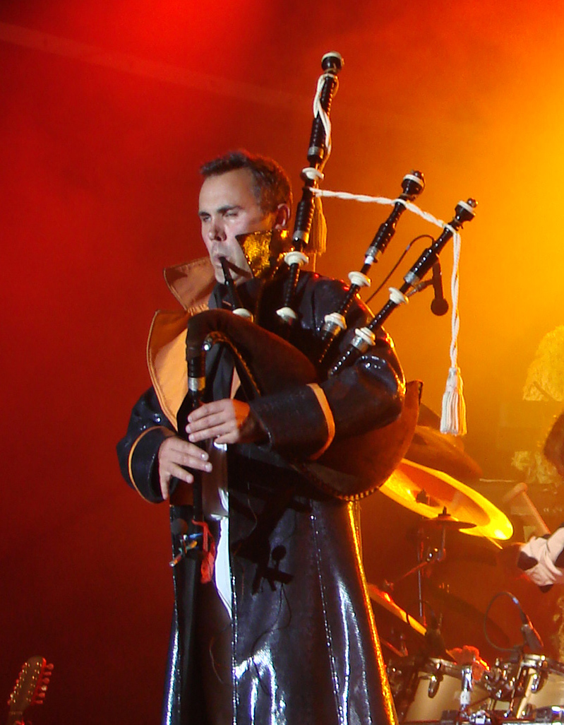 Konan Mevel avec Tri Yann, à l'Aymon Folk Festival (Bogny-sur-Meuse) le 4/08/2007.